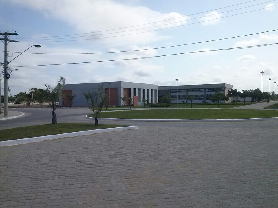 Vista do CEUNES